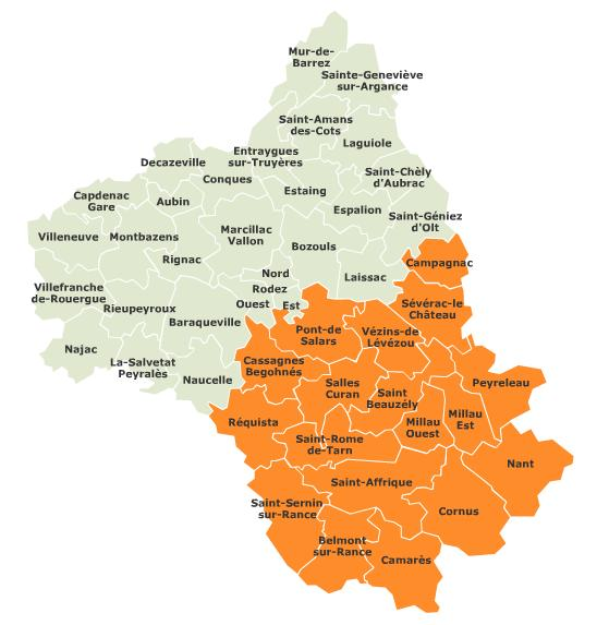 Territoire couvert par la troisième circonscription de l'Aveyron, Midi-Pyrénées, France.